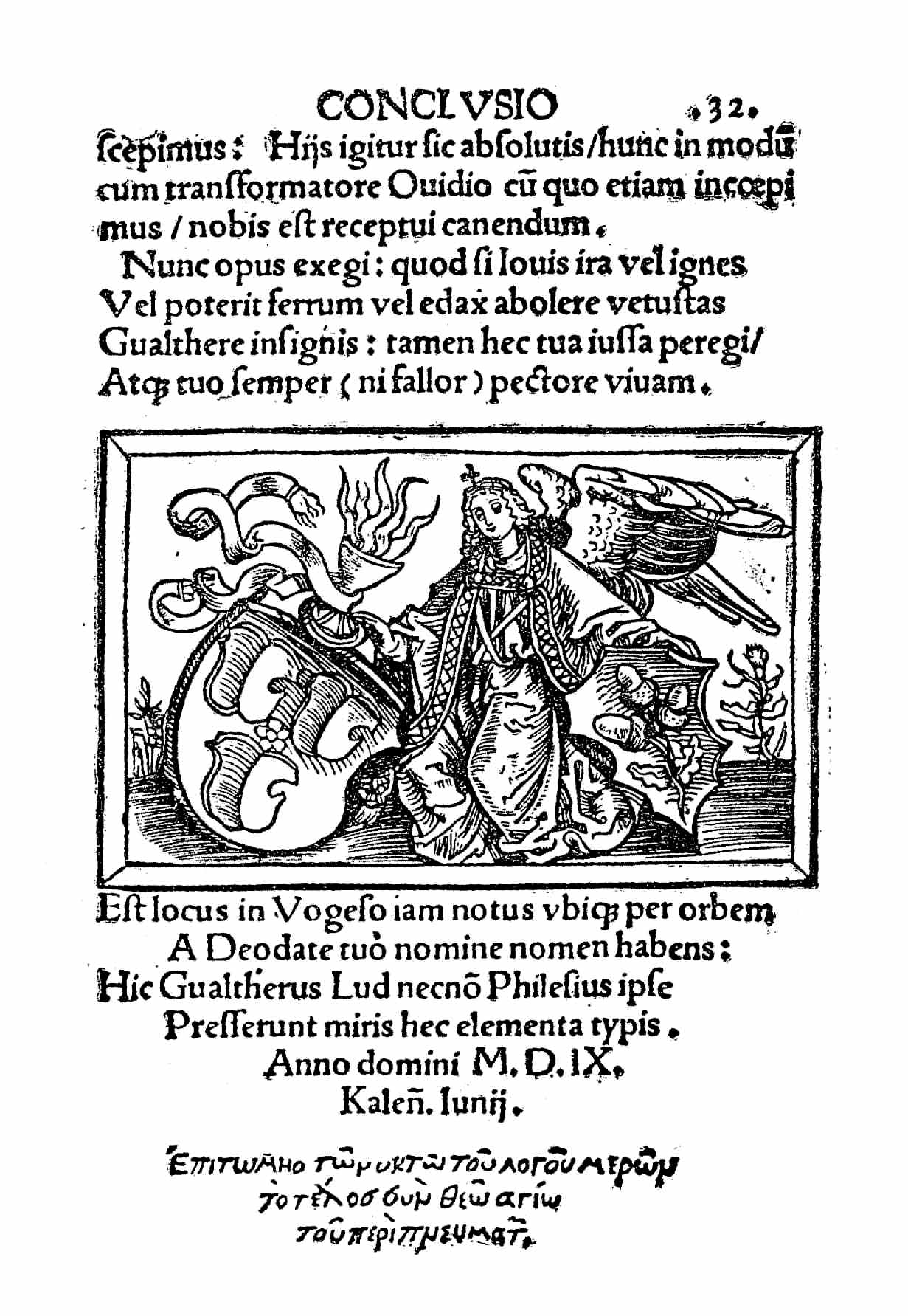 Page de conclusion de la "Grammatica Figurata" de Matthias Ringmann. Sur la gravure on distingue à gauche les armoiries du chanoine Vautrin Lud, et à droite le blason de la ville d'Eichhoffen en Alsace (Eiche = chêne en allemand), où naquit Ringmann.